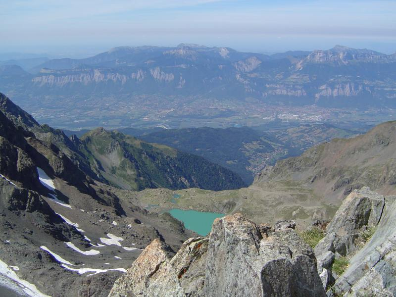 Vue sur la vallée Grenobloise depuis le sommet de la Croix de Belledonne, au fond le massif de Chartreuse 2005. Cevenol2